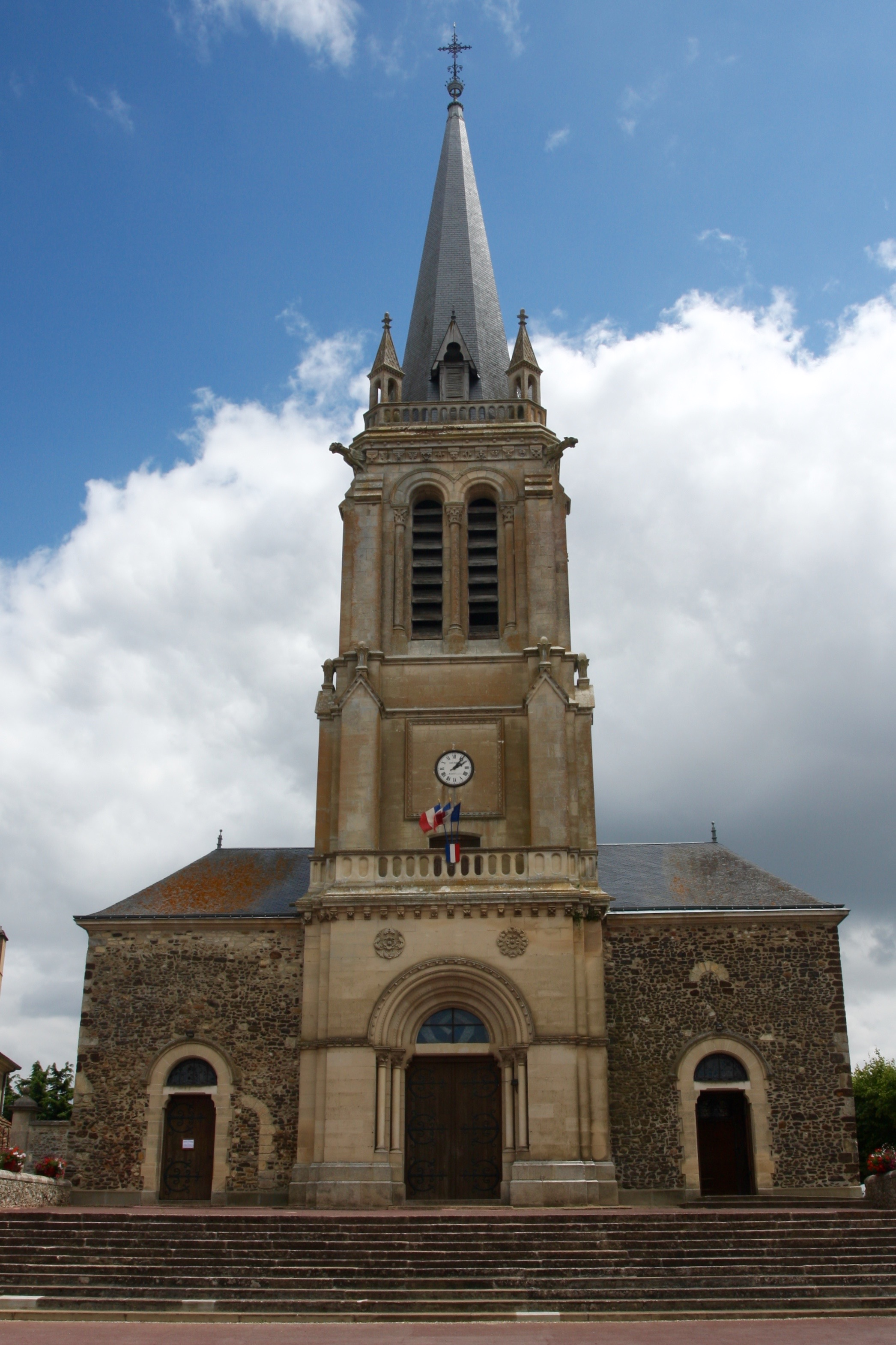 Eglise Saint-Sulpice et Saint-Etienne, Bonnetable